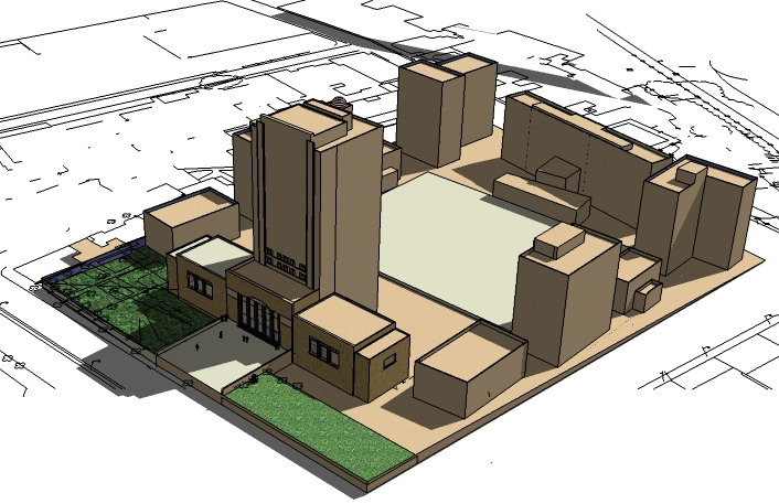 Proyecto de campus universitario de la UMSA, Emilio Villanueva